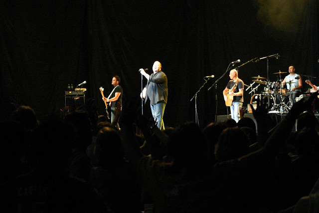 MercyMe en un concierto en 2006